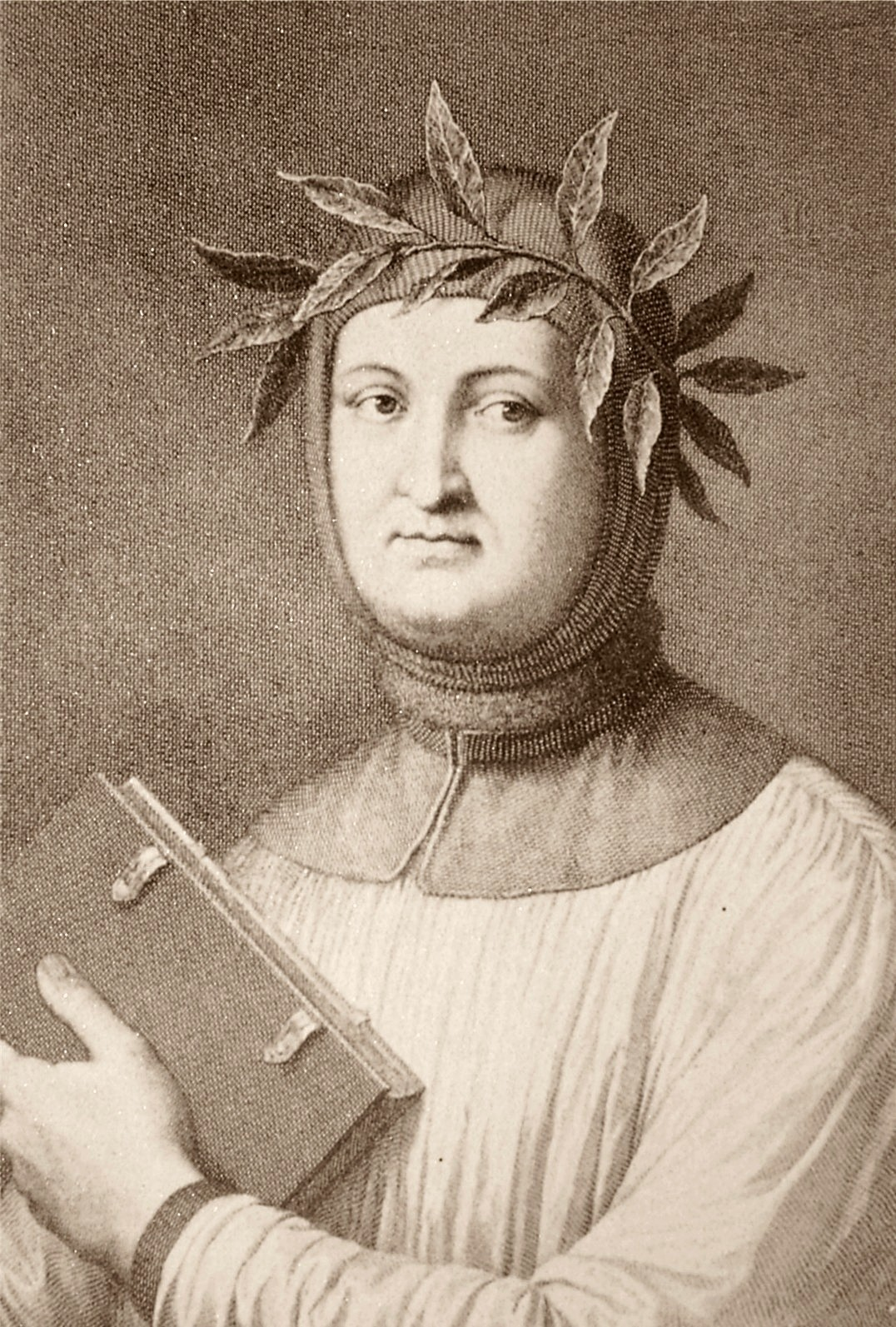 Francesco Petrarca 1304-1374 italienischer Dichter und Geschichtsschreiber.